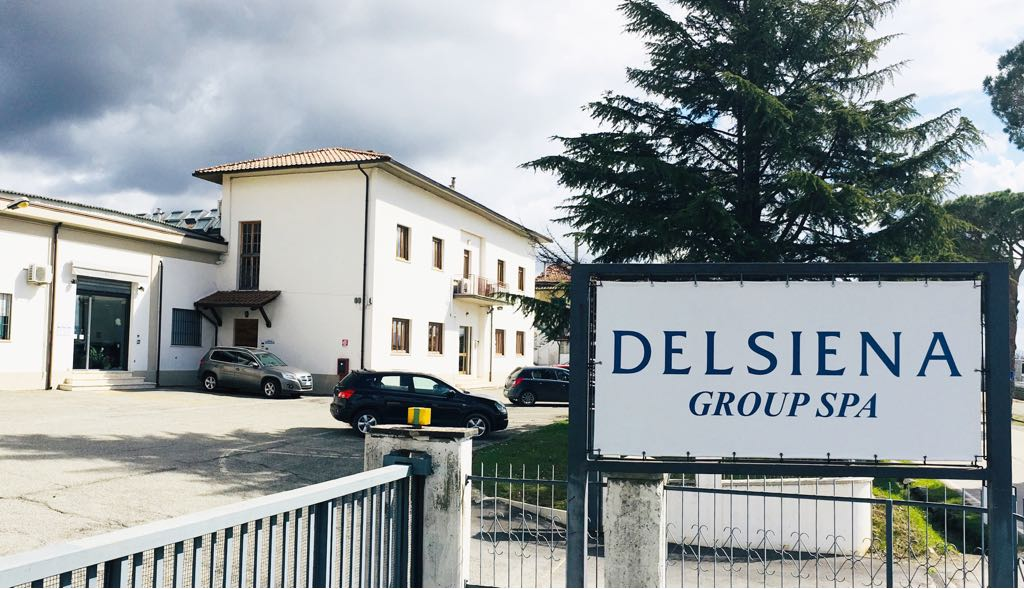 Camiceria Delsiena Sansepolcro al 2018